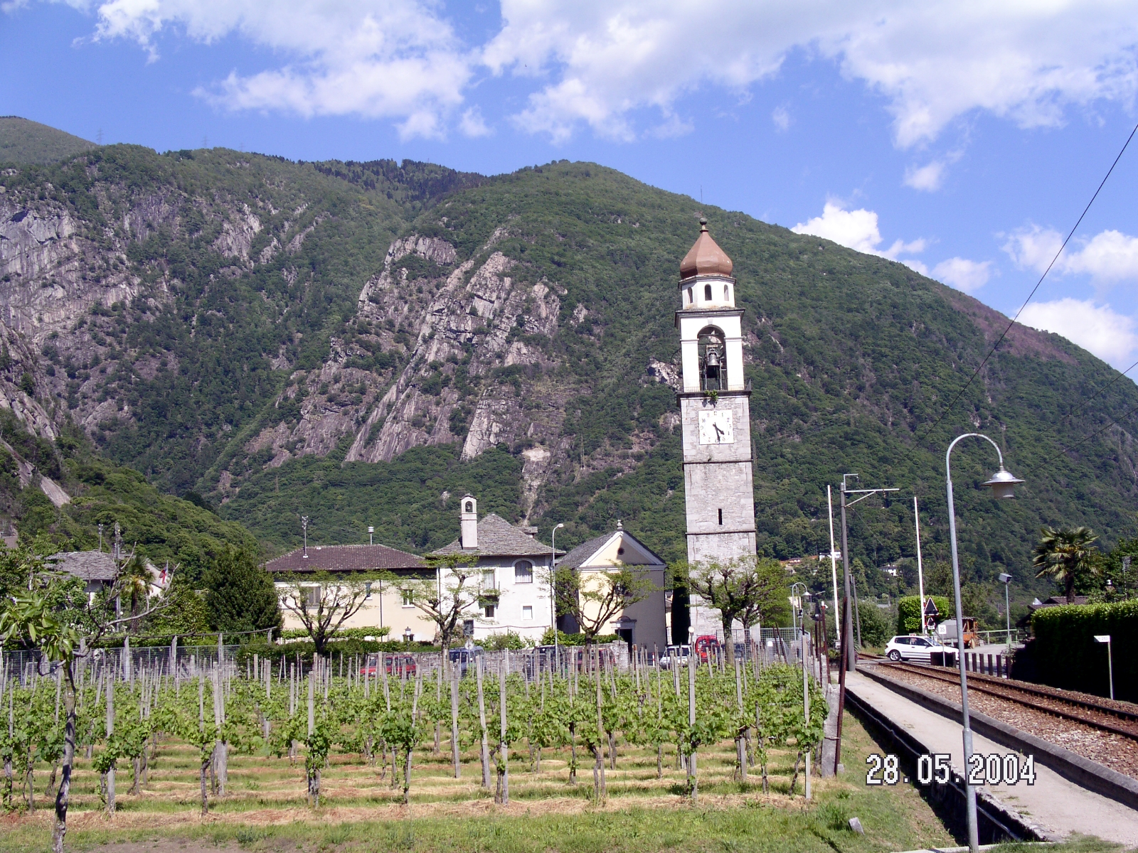 Kirche von Tegna, TI (Schweiz)